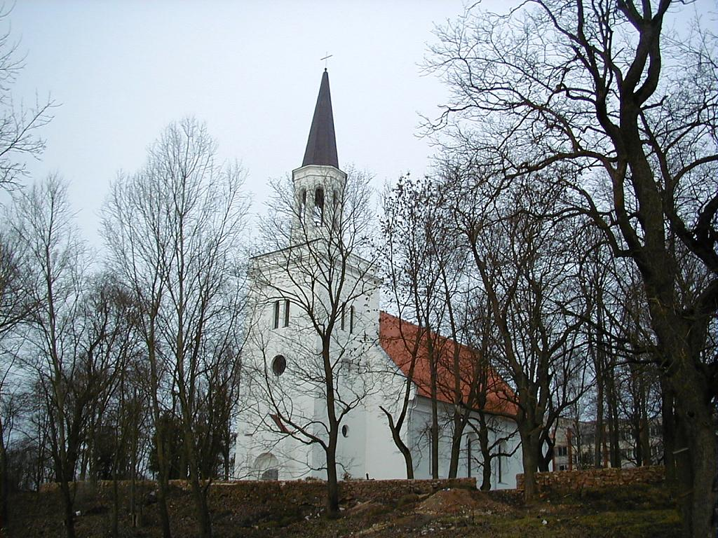 Iecavas baznīca 2001-02-11